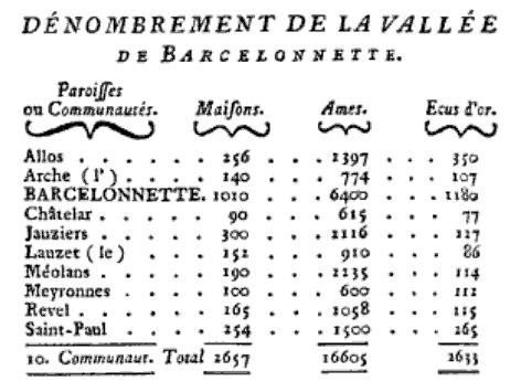 Dénombrement de la Vallée de Barcelonnette (aujourd'hui Vallée de l'Ubaye) en 1763. De Jean-Joseph Expilly dans Dictionnaire géographique, historique et politique des Gaules et de la France, Volume 1 (1763).